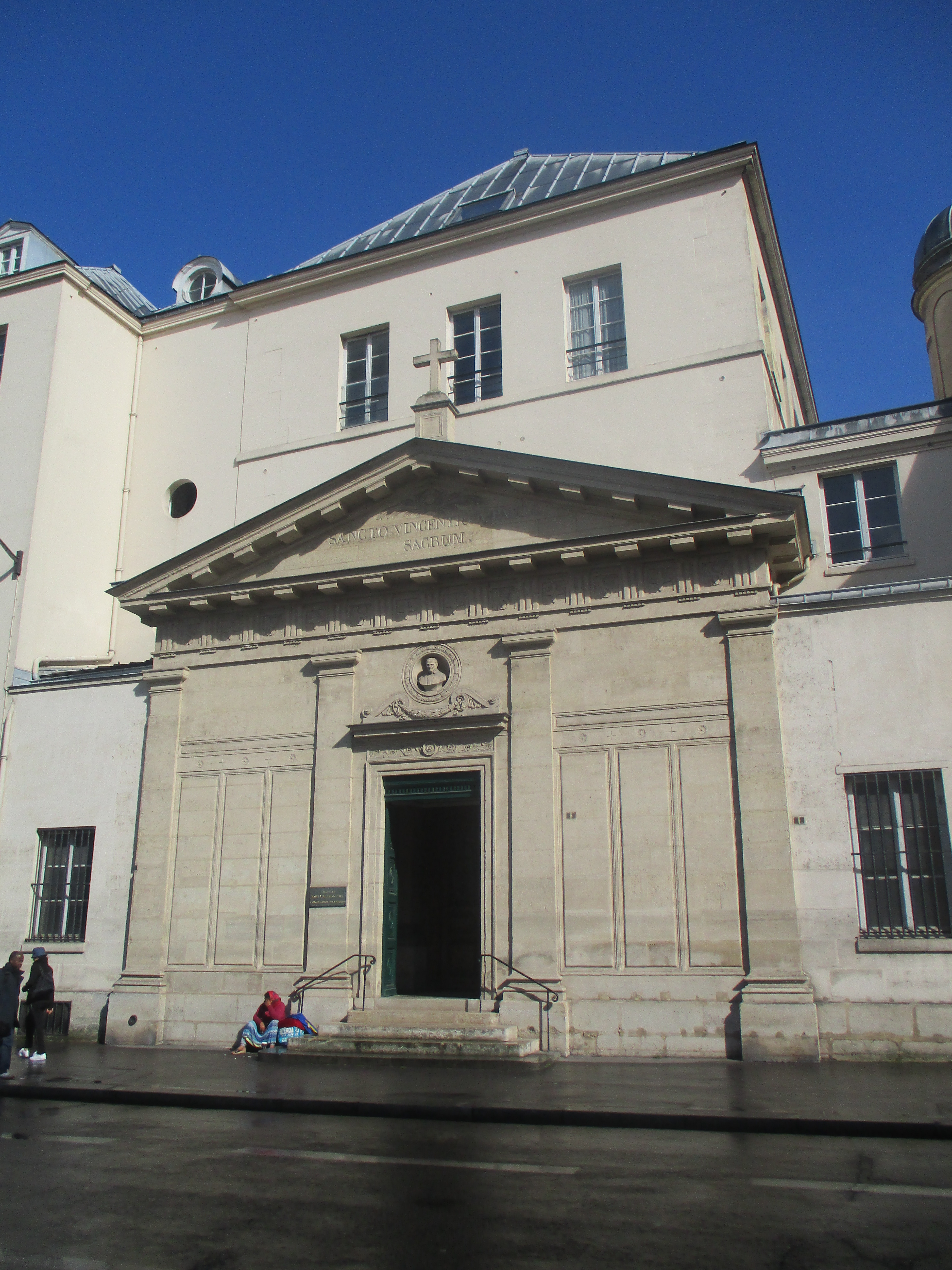 Chapelle Saint-Vincent-de-Paul (rue de Sèvres, Paris) où repose le corps de saint Vincent de Paul.